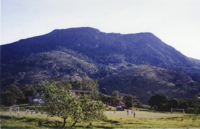 Esta imagem é da serra do bairro Tijuca, situado no município de Cachoeiro de Itapemirim, ES. A foto foi tirada por mim mesma e, portanto, não violo os direitos de propriedade.